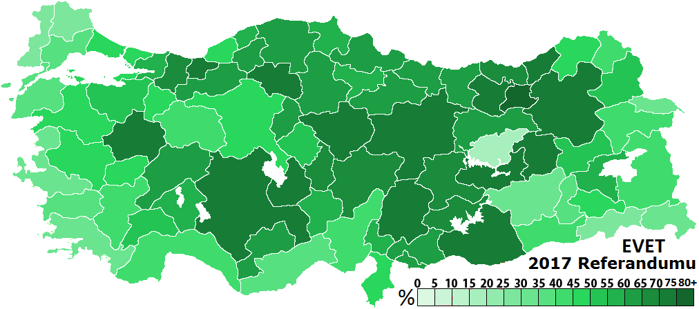 Evet oyları illere göre oranları